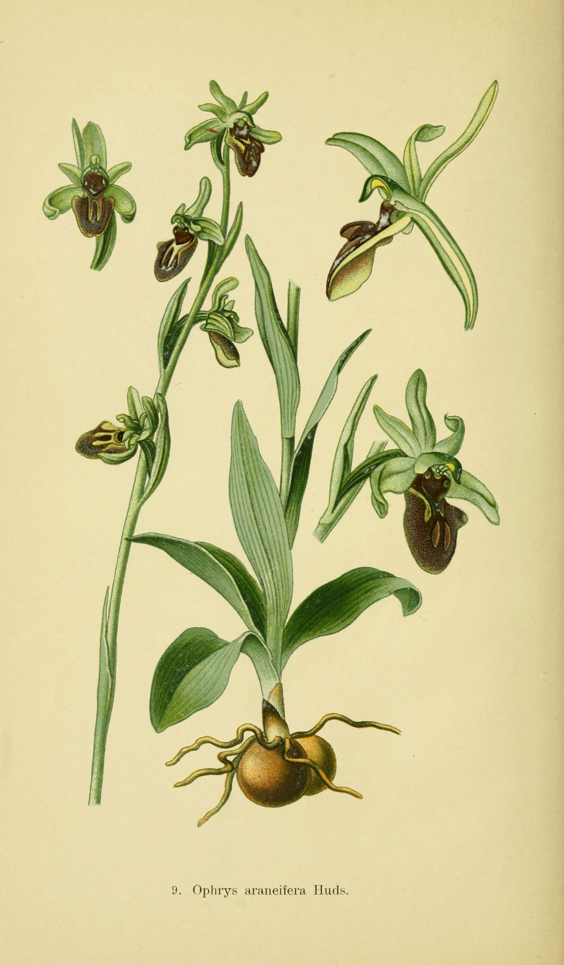 9. Ophrys araneifera Iluds.